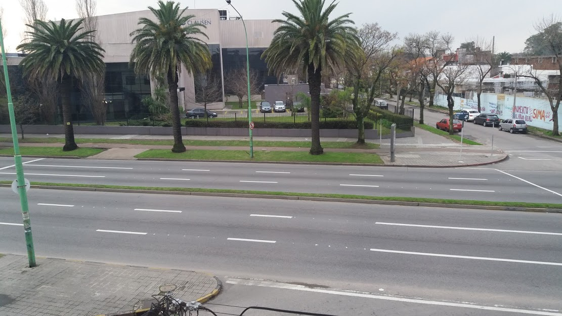 Blvar. Arigas a la altura de Atahualpa, Montevideo, Uruguay.